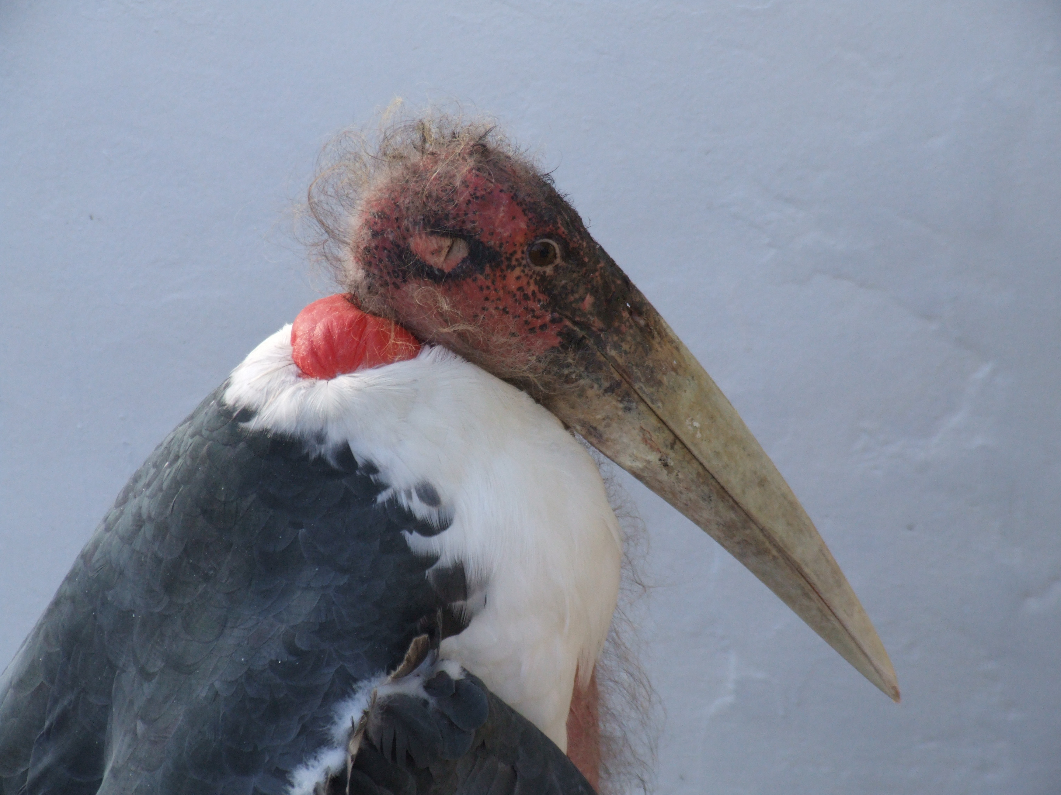 Leptoptilos crumeniferus Marabout au Parc forestier et zoologique de Hann (Dakar, Sénégal)